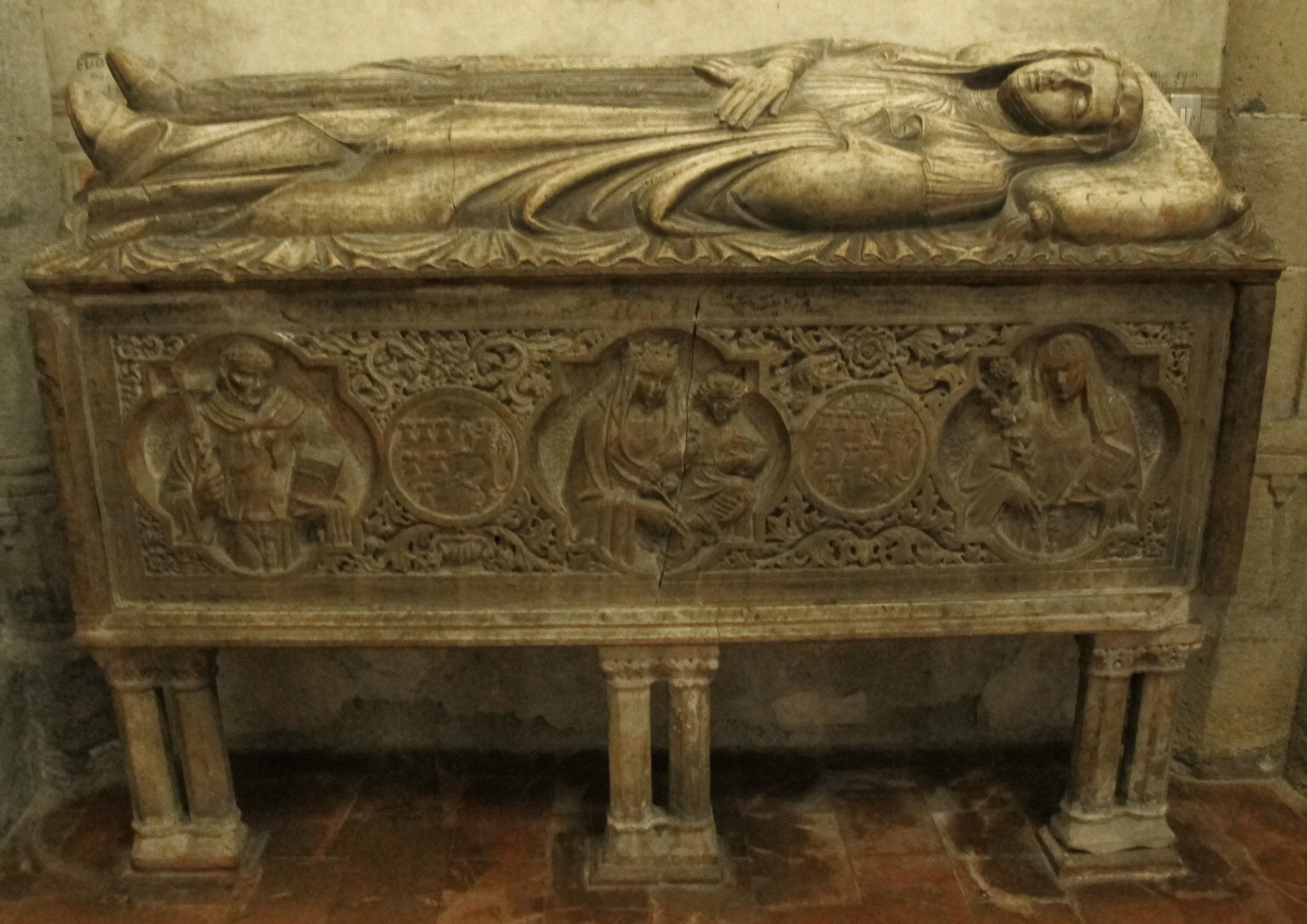 Santa Chiara (Napoli)